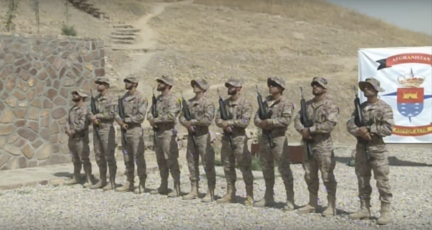 Arriamos bandera en Qala i Naw. El ministro Pedro Morenés ha viajado a Afganistán para presidir el acto de transferencia de la base 'Ruy González de Clavijo' a las autoridades afganas. Morenés ha destacado la "unión imperecedera" que se ha forjado entre Afganistán y España en los más de 10 años de misión. Tras la ceremonia de traspaso, se han arriado las banderas de España y de la OTAN y se ha izado la bandera afgana. Con este acto se revierten los terrenos y se cede parte de la infraestructura y material de la base española a la 3ª brigada del 207 cuerpo del Ejército de Afganistán, encargada, a partir de ahora, de la seguridad en la provincia de Badghis. Se pone así punto final a una misión de ayuda a la población y adiestramiento al Ejército afgano en la que el respeto hacia ellos ha sido una constante en el trabajo diario de nuestros militares. Finalizada la ceremonia, Morenés se ha trasladado a Herat donde, en un recorrido por las instalaciones logísticas, ha supervisado personalmente las actividades del repliegue.